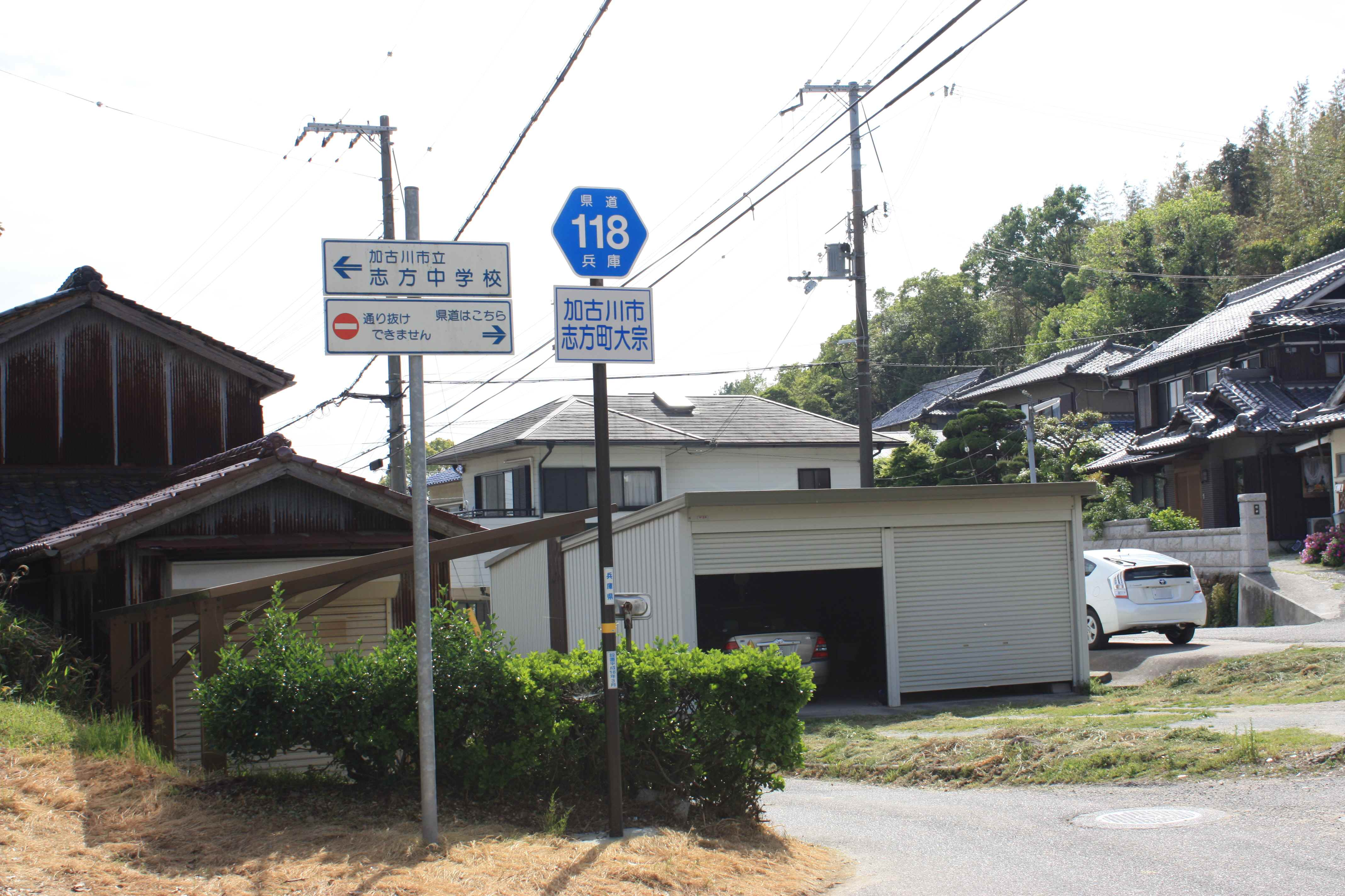 Hyogo prefectural road No.118